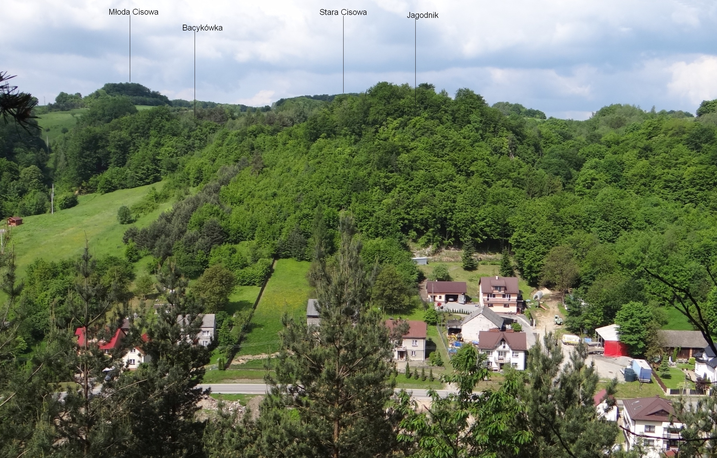 Dolina Szklarki